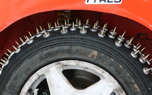 Bei Eisrennen verwendete Spikesreifen, hier von Schwedens Eisrennen-Meister 2007 Fredrik Tiger, BMW Compact.